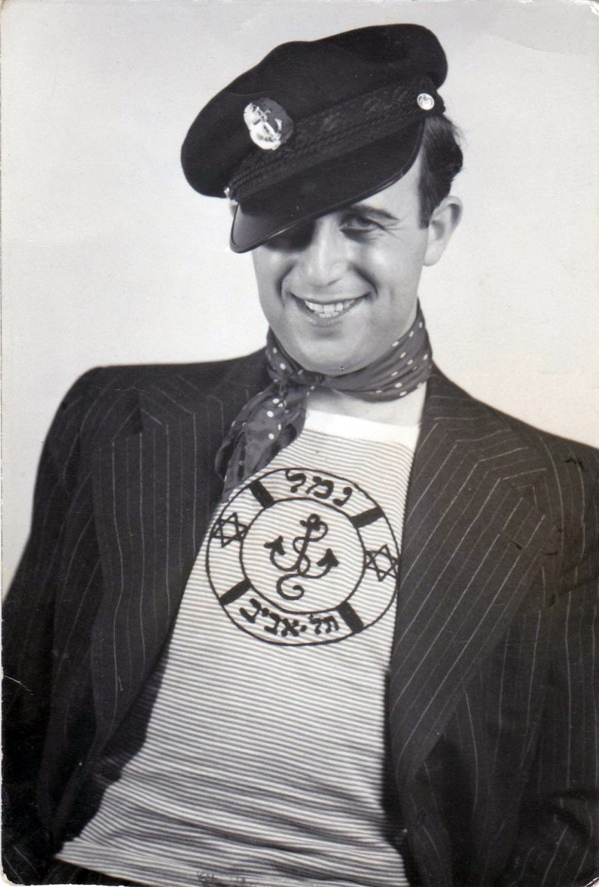 דיוקנו של יוסף גולנד